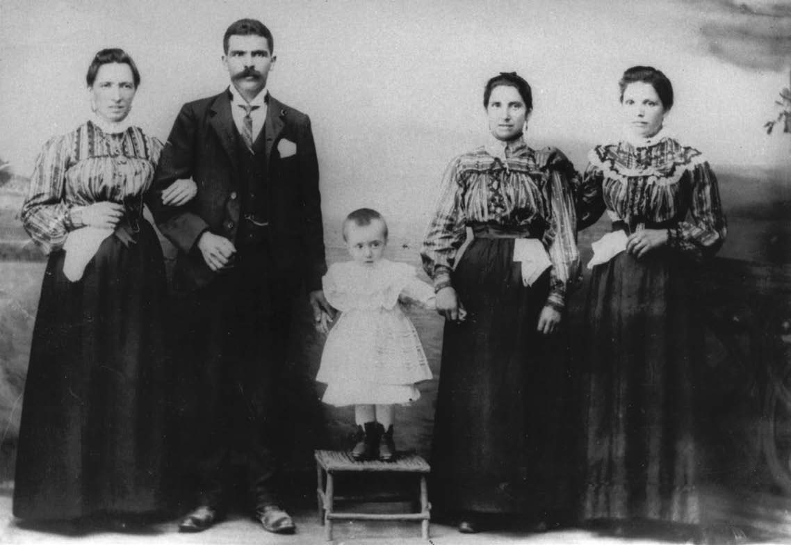 De esq. a dereita, a tía Erundina, o tío Lourenzo, o meniño Antonio Fraguas Fraguas, súa nai e a tía María